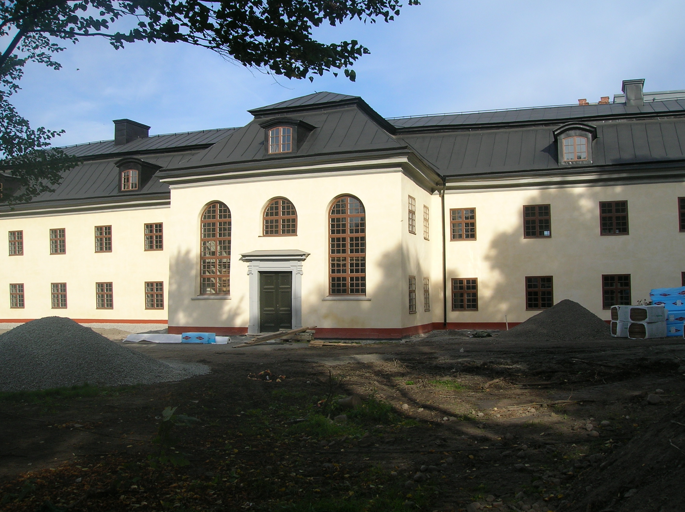 Danvikens Hospital har under 2008-2009 renoverats av fastighetsägaren NCC tillsammans med Nyréns arkitektkontor. Ansvarig arkitekt för renoveringen är Ola Nilsson.